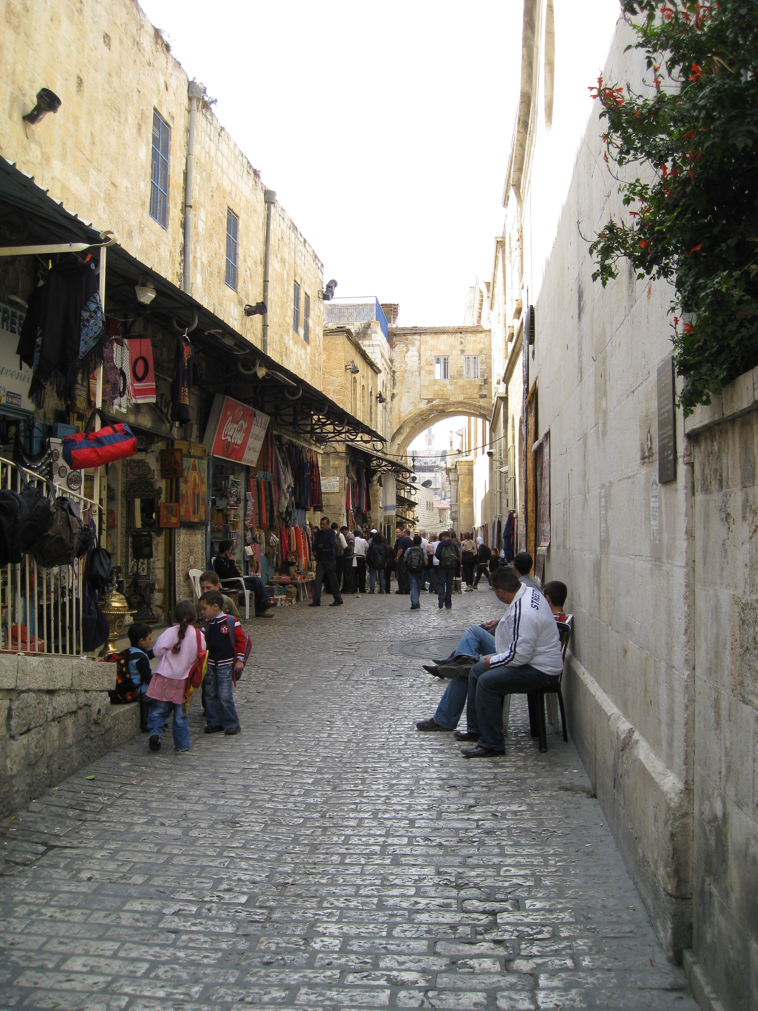 Jerusalem, Israel Jerusalem